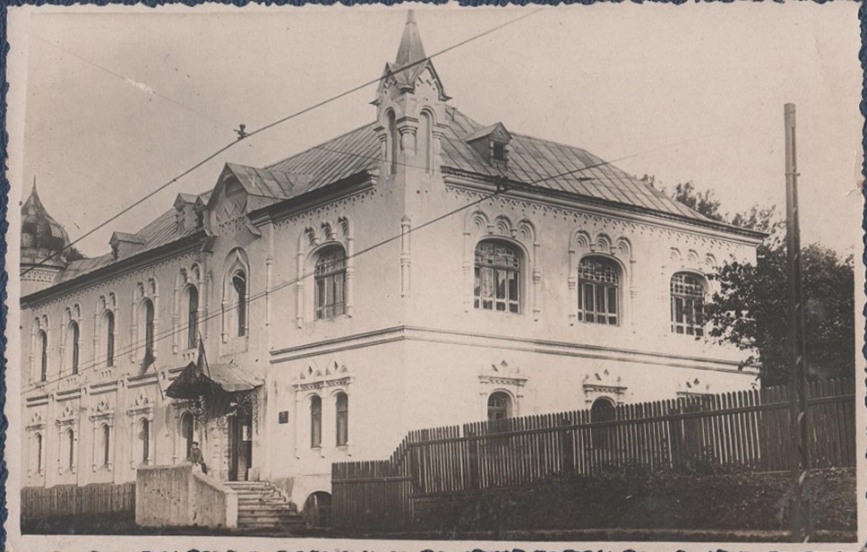 Беларуская (тарашкевіца): Менск (Miensk), вуліца Захараўская (vulica Zacharaŭskaja). Беларускі дзяржаўны музэй у будынку колішняга Архірэйскага падвор’я (Archirejskaje padvorje)